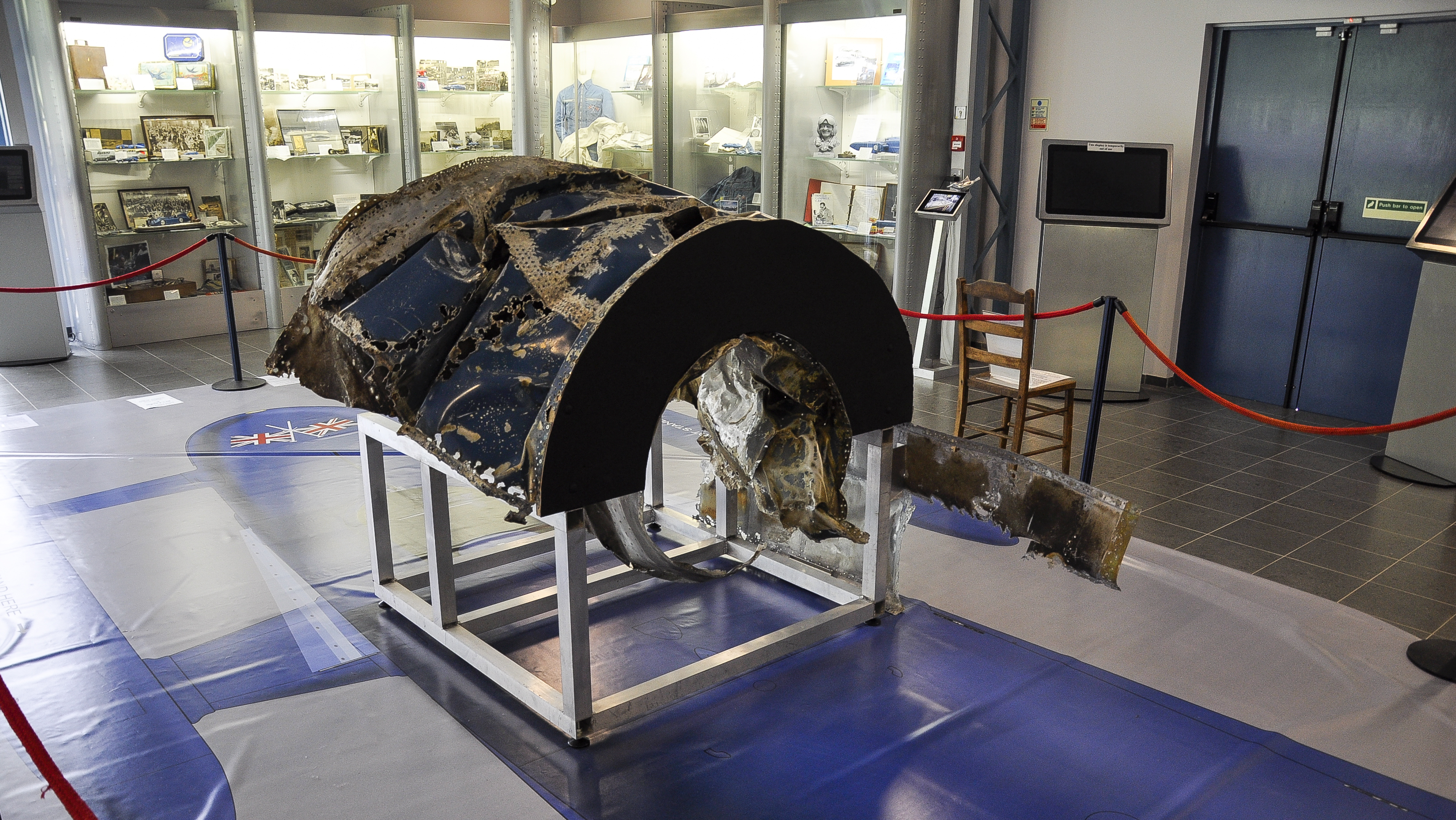 Het Ruskin Museum te Coniston, Cumbria, Engeland - resten van de Bluebird K7 van Donald Campbell